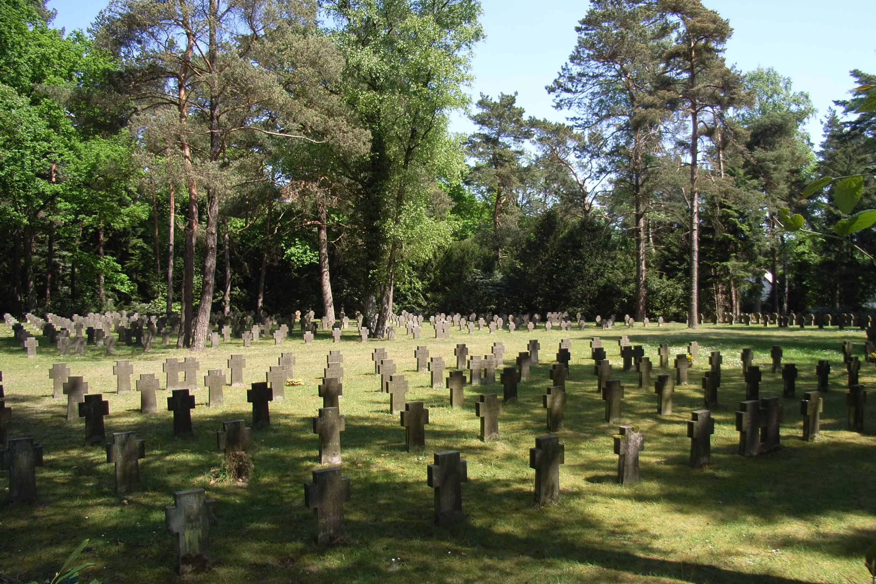 Bielefeld, Deutschland: Bombenopferehrenfeld auf dem Sennefriedhof für 484 Opfer der Bombenangriffe auf Bielefeld im Zweiten Weltkrieg